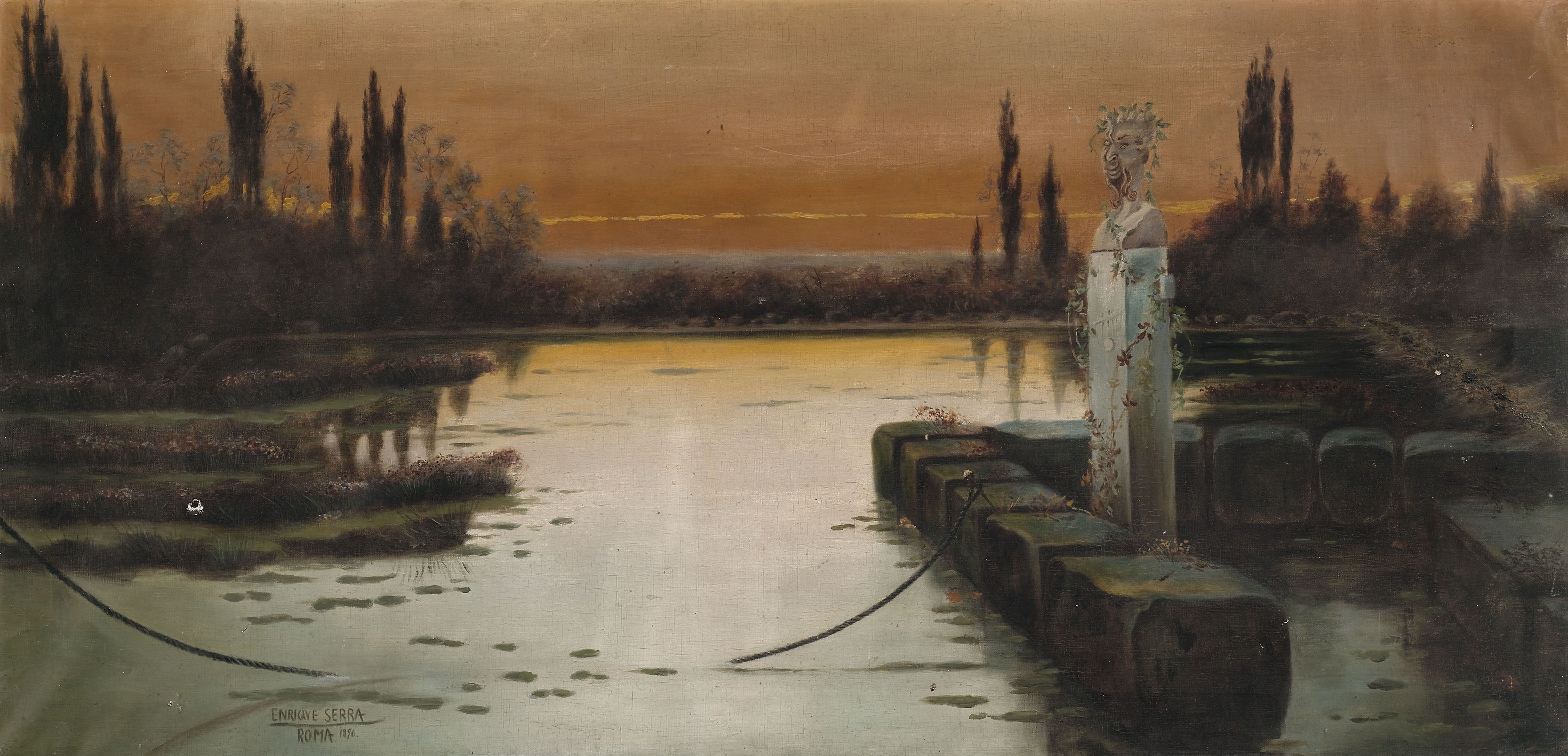 Abendstimmung in den Pontinischen Sümpfen. Öl auf Leinwand, unten links signiert, bezeichnet Roma und datiert 1896. 65 x 135 cm